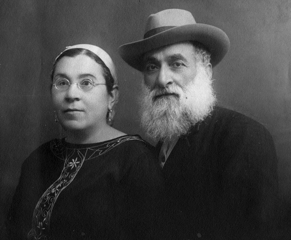 ישראל וחנה חכמישווילי, בין 1920 ל-1295 לערך. אוסף משפחת ולירו. הוריה של ויקטוריה חכמישווילי, לימים – אשת גבריאל ולירו.